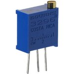 Многооборотный резистор для точной настройки в радиоэлектронике